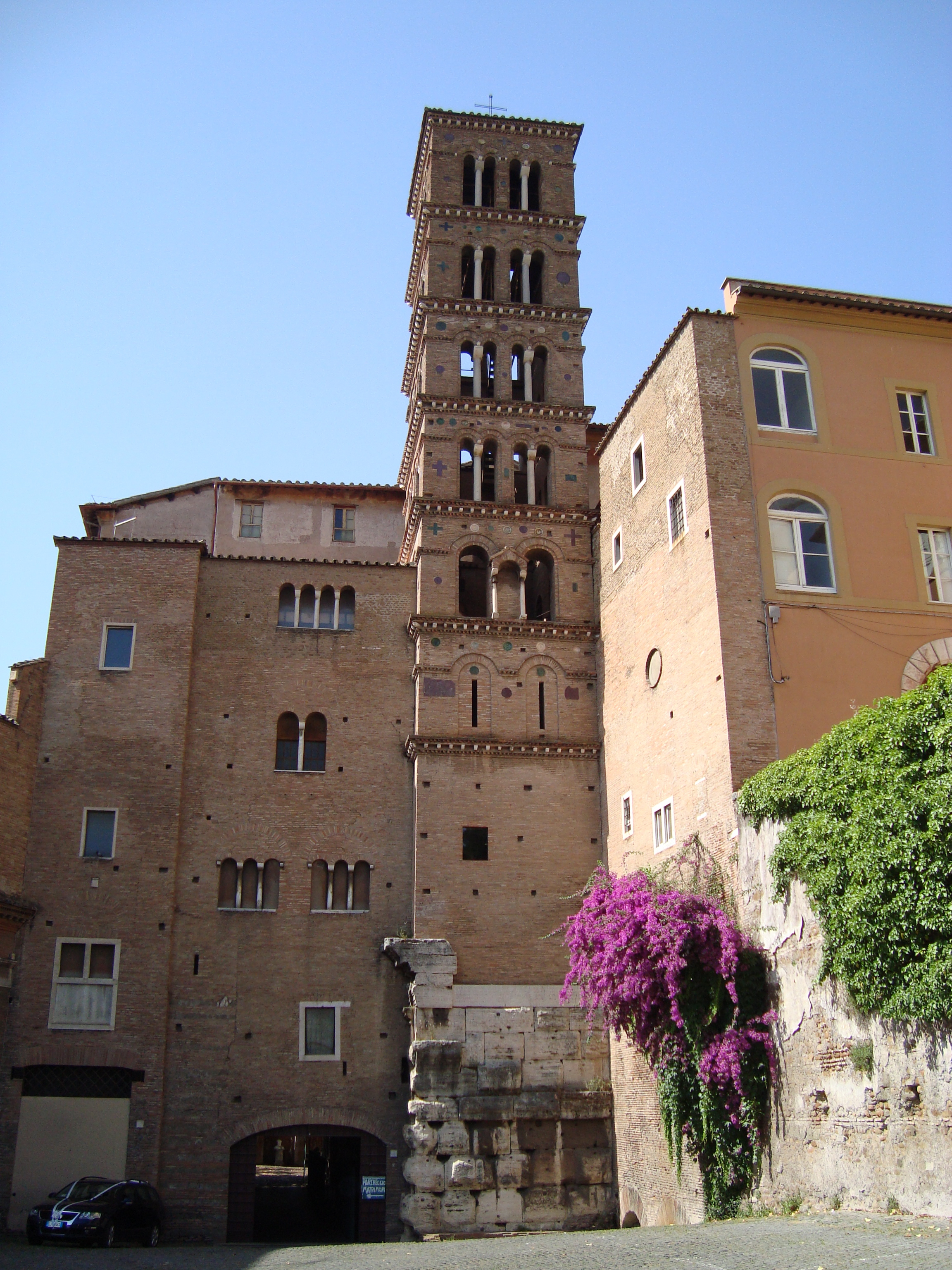 Clocher de la Basilique Santi Giovanni e Paolo al Celio de rome